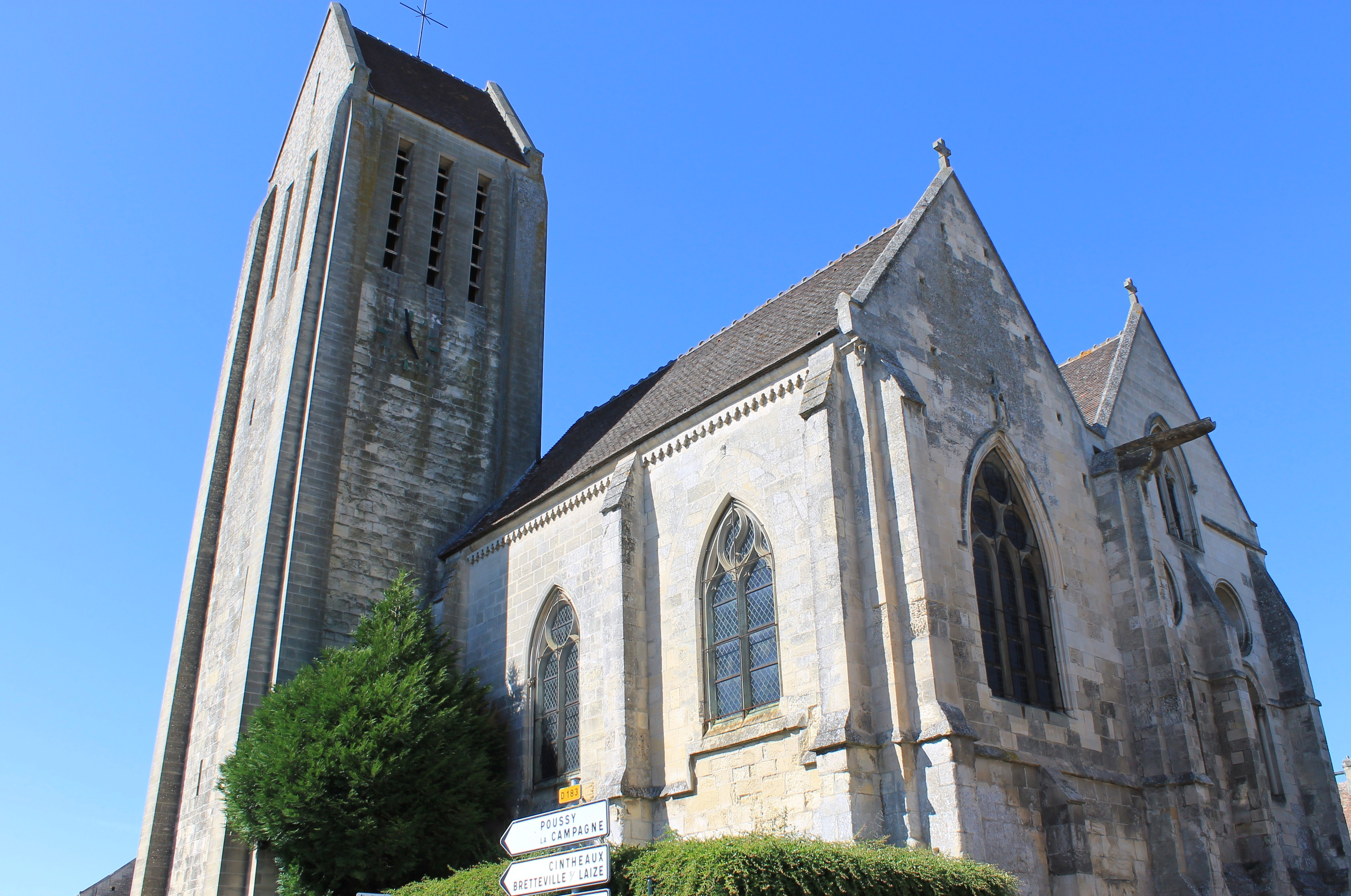 Eglise de Saint-Sylvain (Calvados)